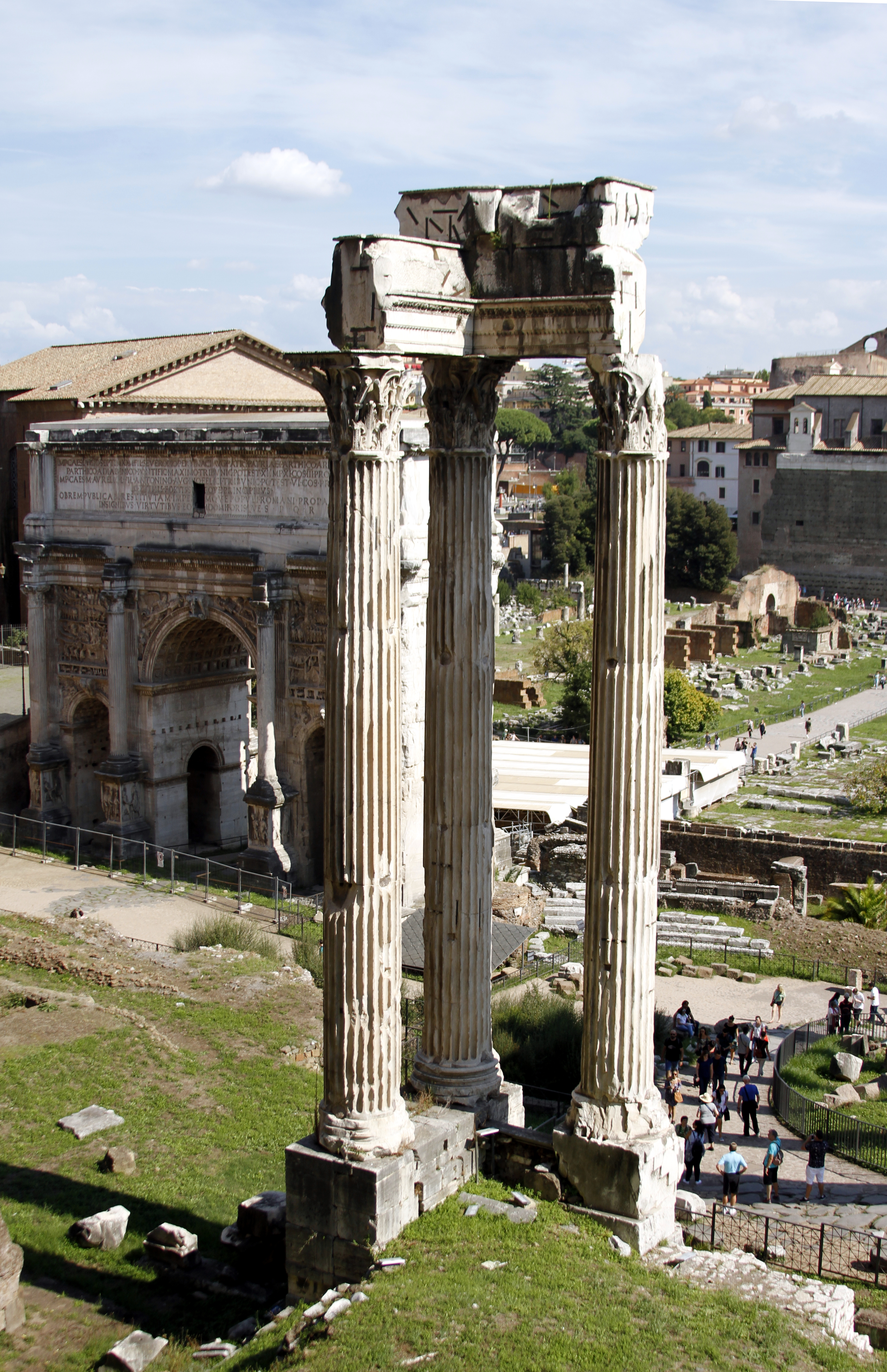 Roman Forum - Rome